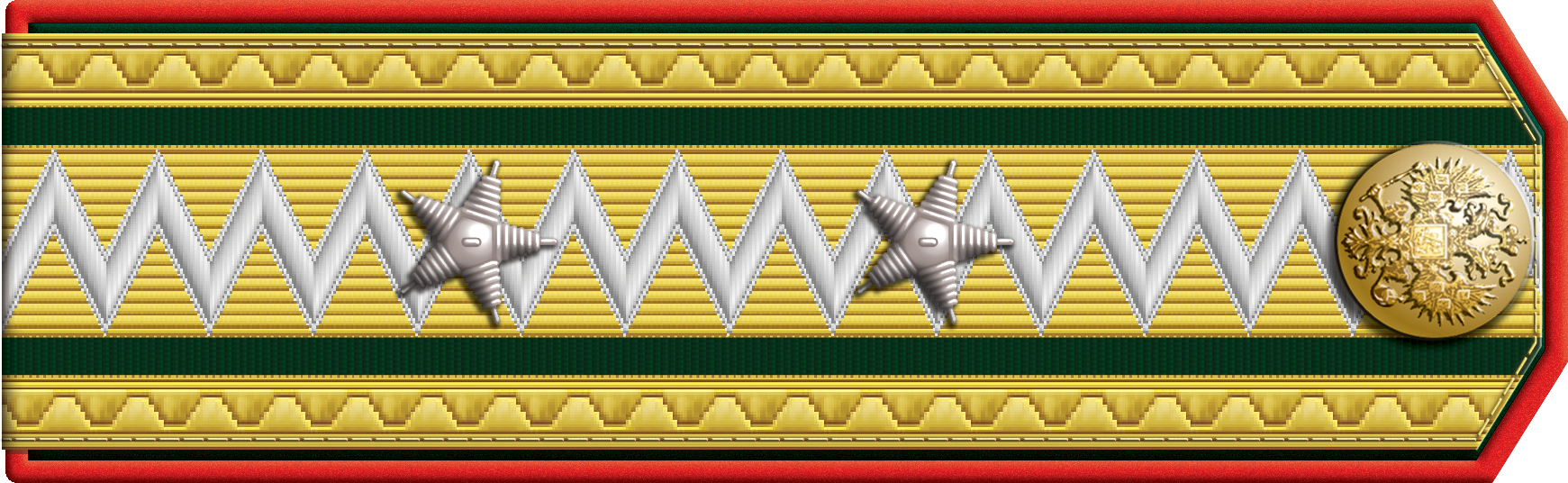 Погон: отставной капельмейстер 8-го класса военного ведомства, 1904–1917 гг.